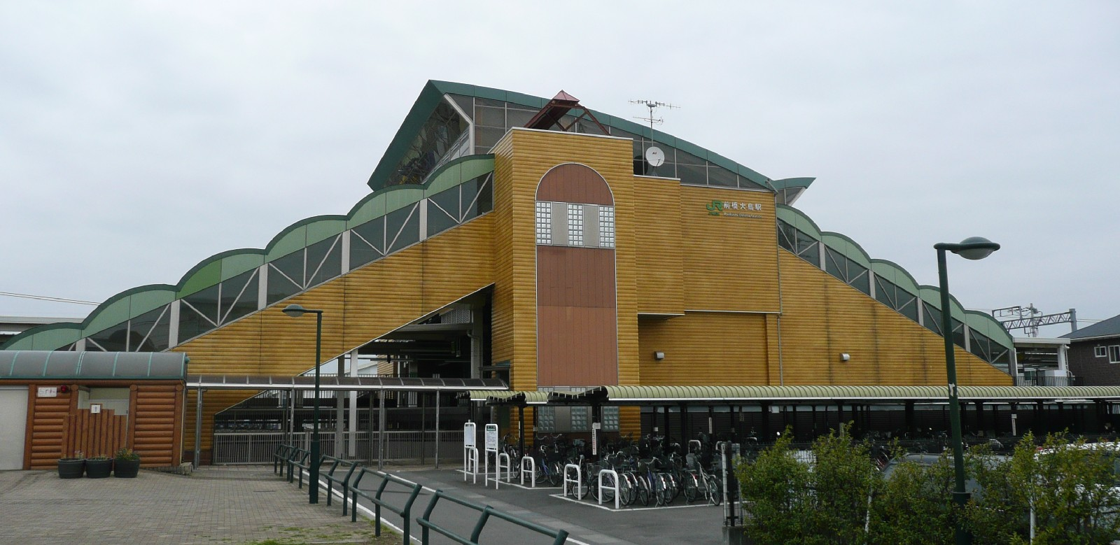 前橋大島駅南口